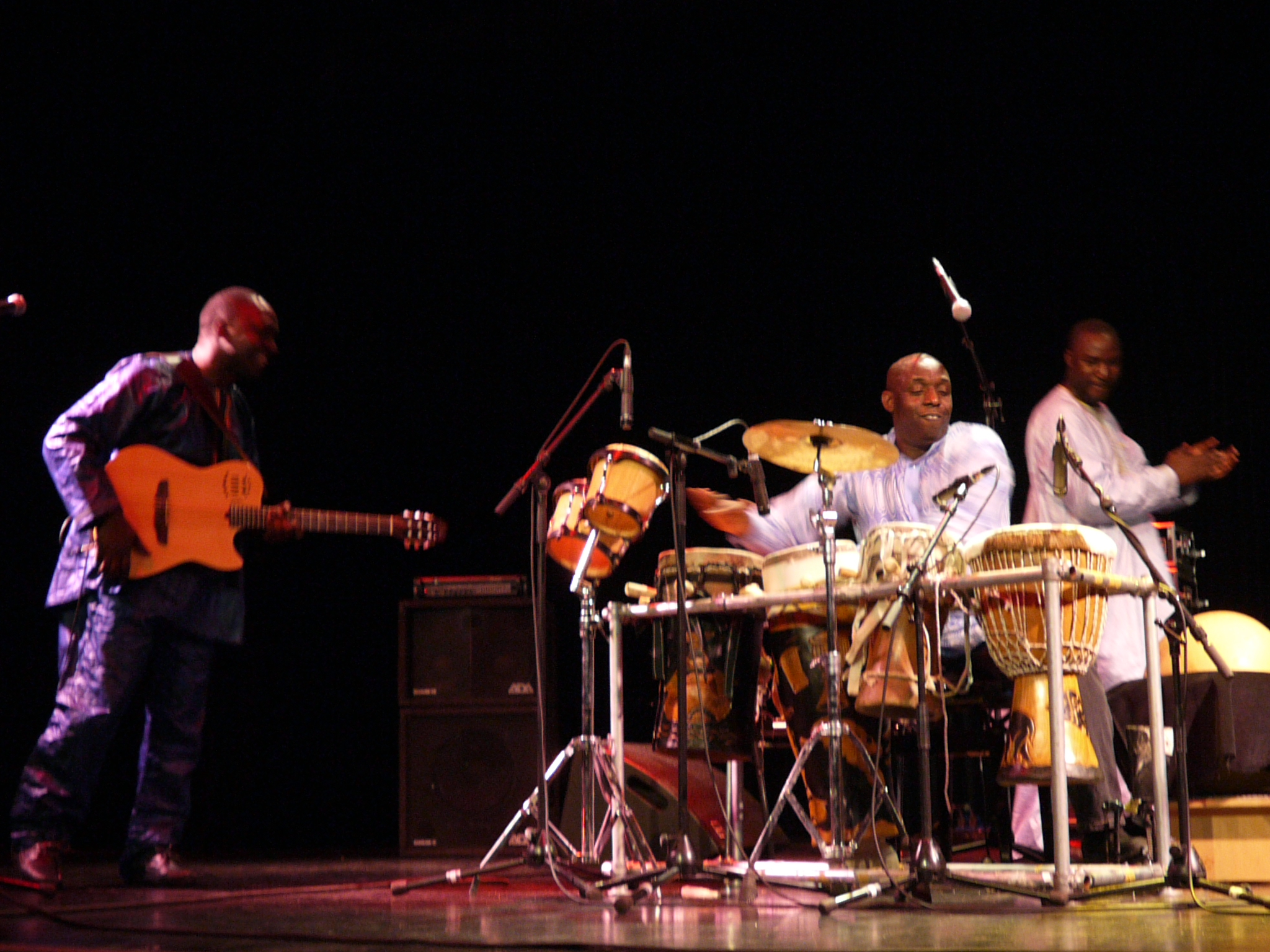 Les Frères Guissé (groupe sénégalais) en concert à Vandoeuvre (Meurthe-et-Moselle)